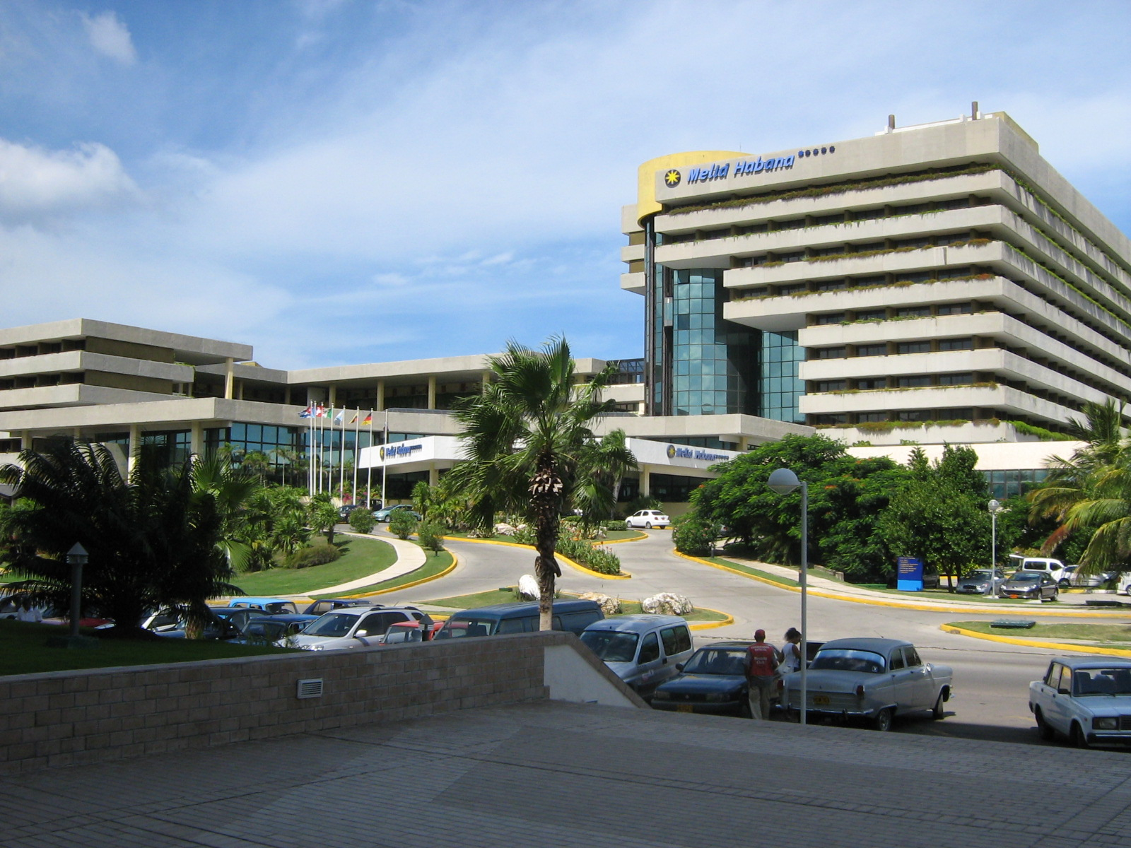 Hotel Melia Habana